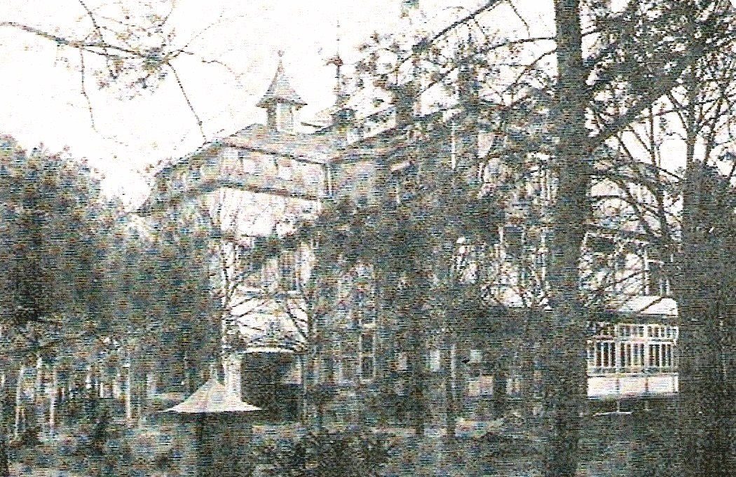 Scan eines alten Familienfotos